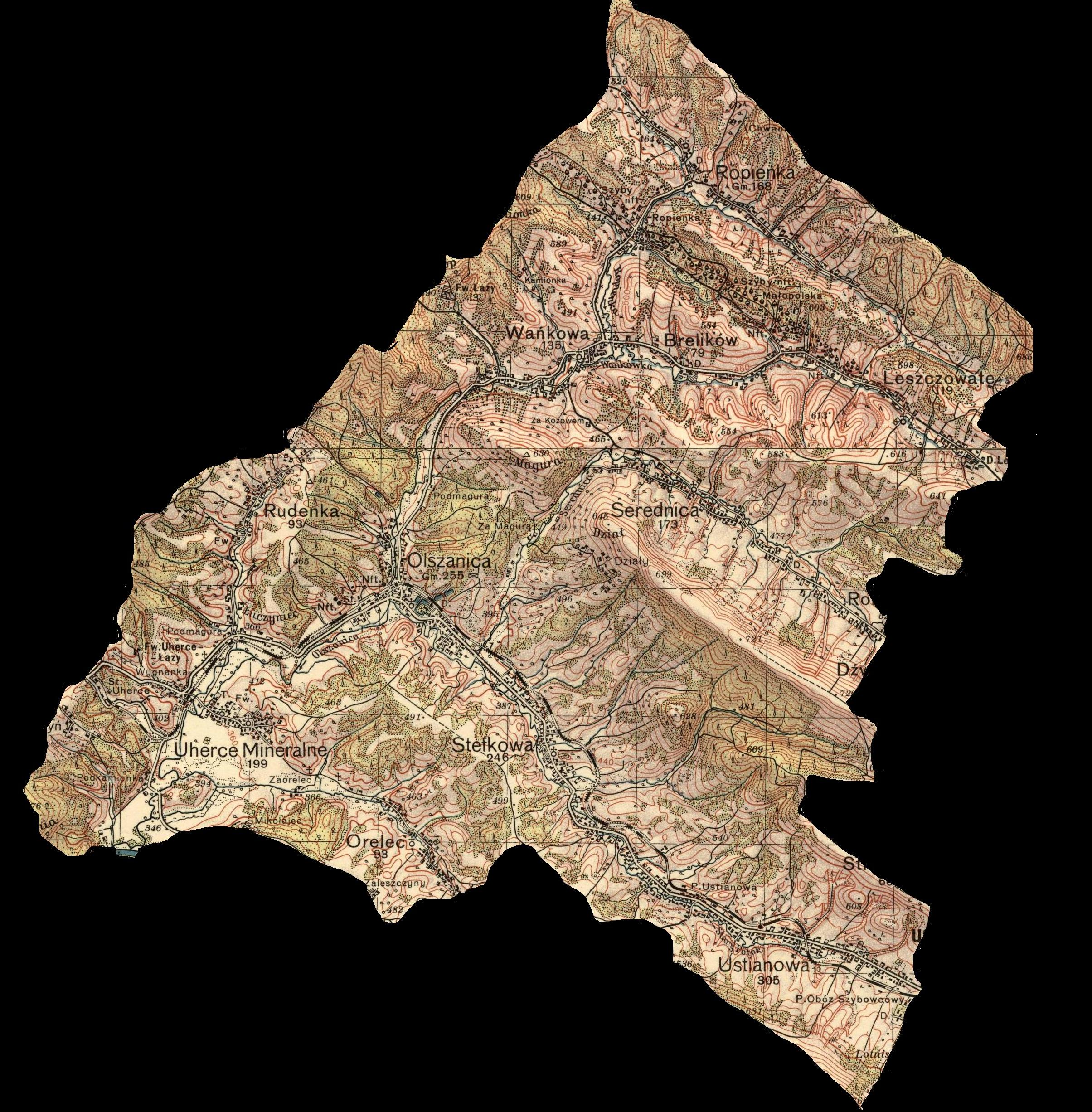 Zlewnia rzeki Olszanicy opracowana na podstawie map Wojskowego Instytutu Geograficznego z 1938r.